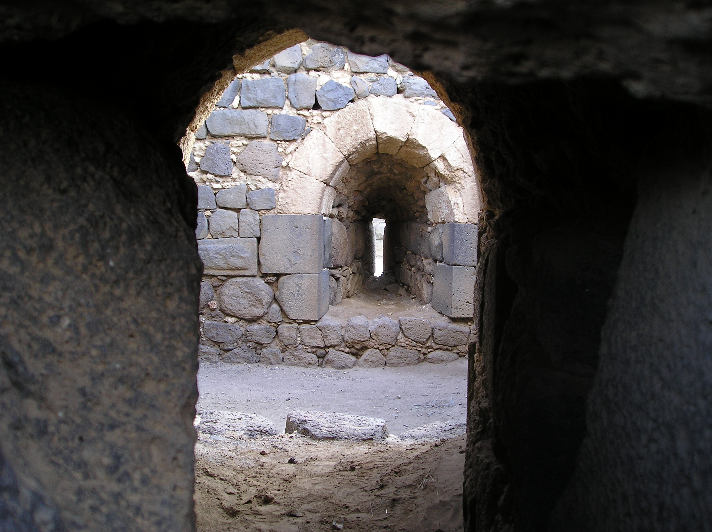 Belvoir (twierdza) - Teren izraelskiego parku narodowego. Widok na Dolinę Ezdrelon i Górę Tabor.